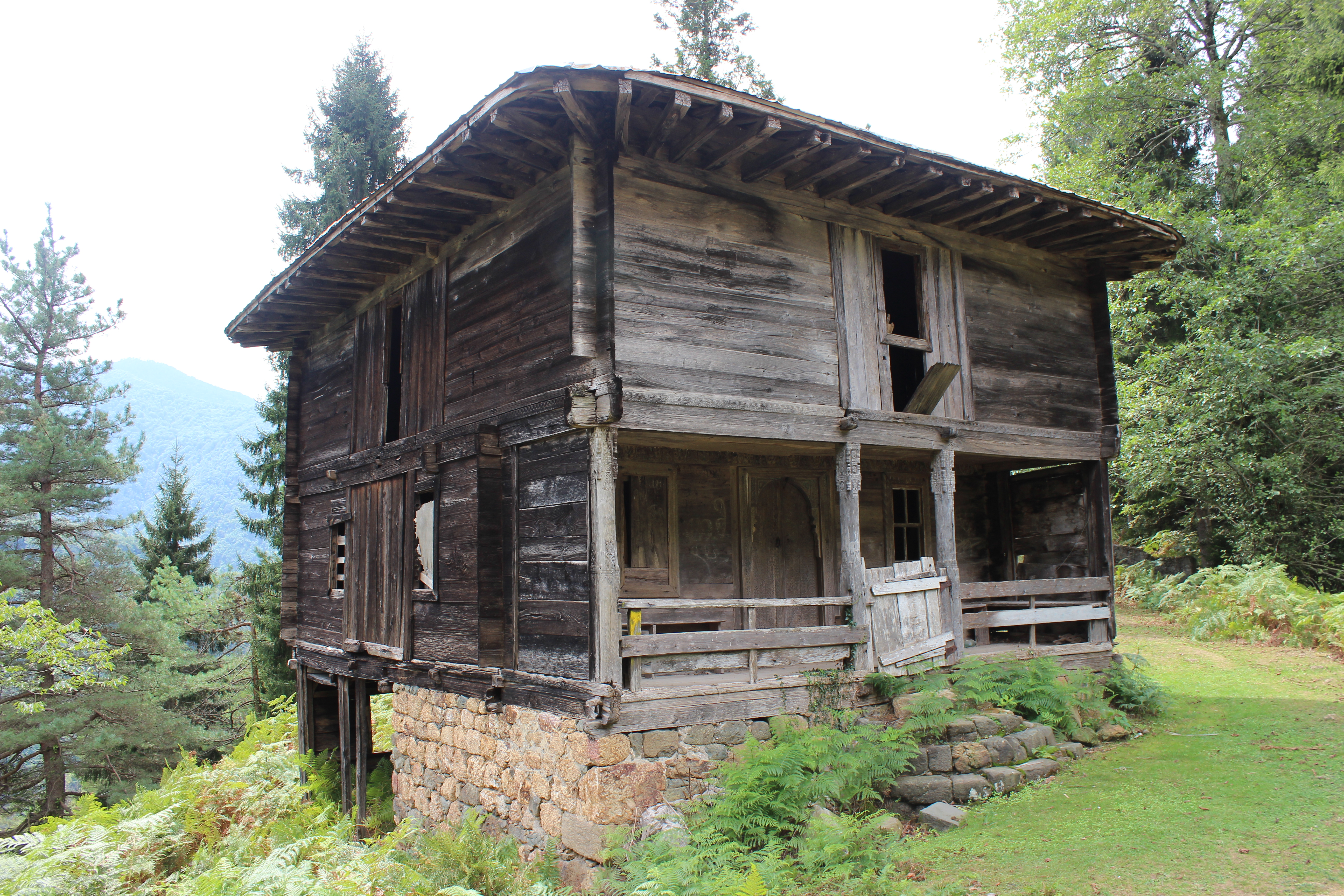 სოფელ გულების მეჩეთი